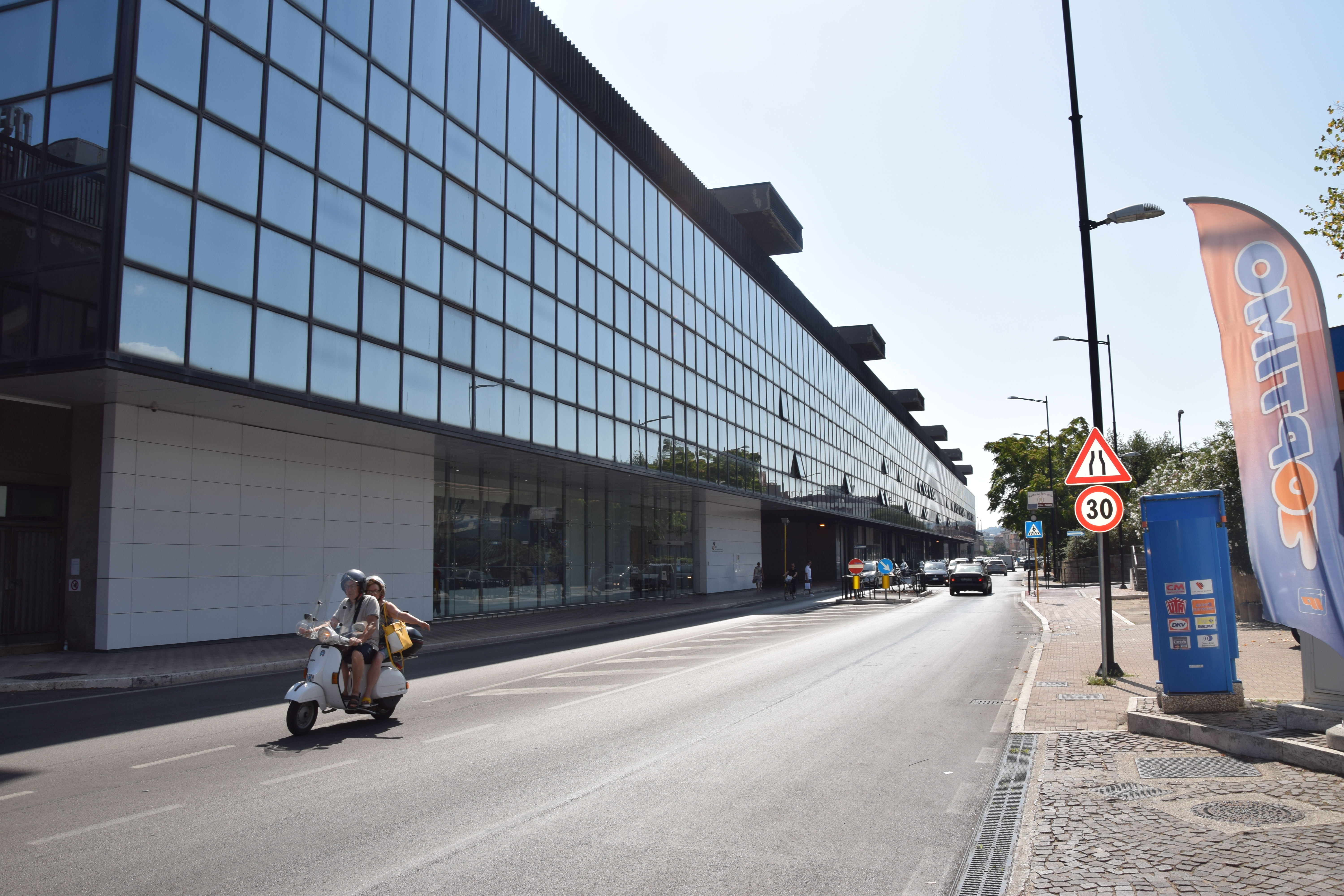 Il lato su via Enzo Ferrari della stazione di Pescara Centrale